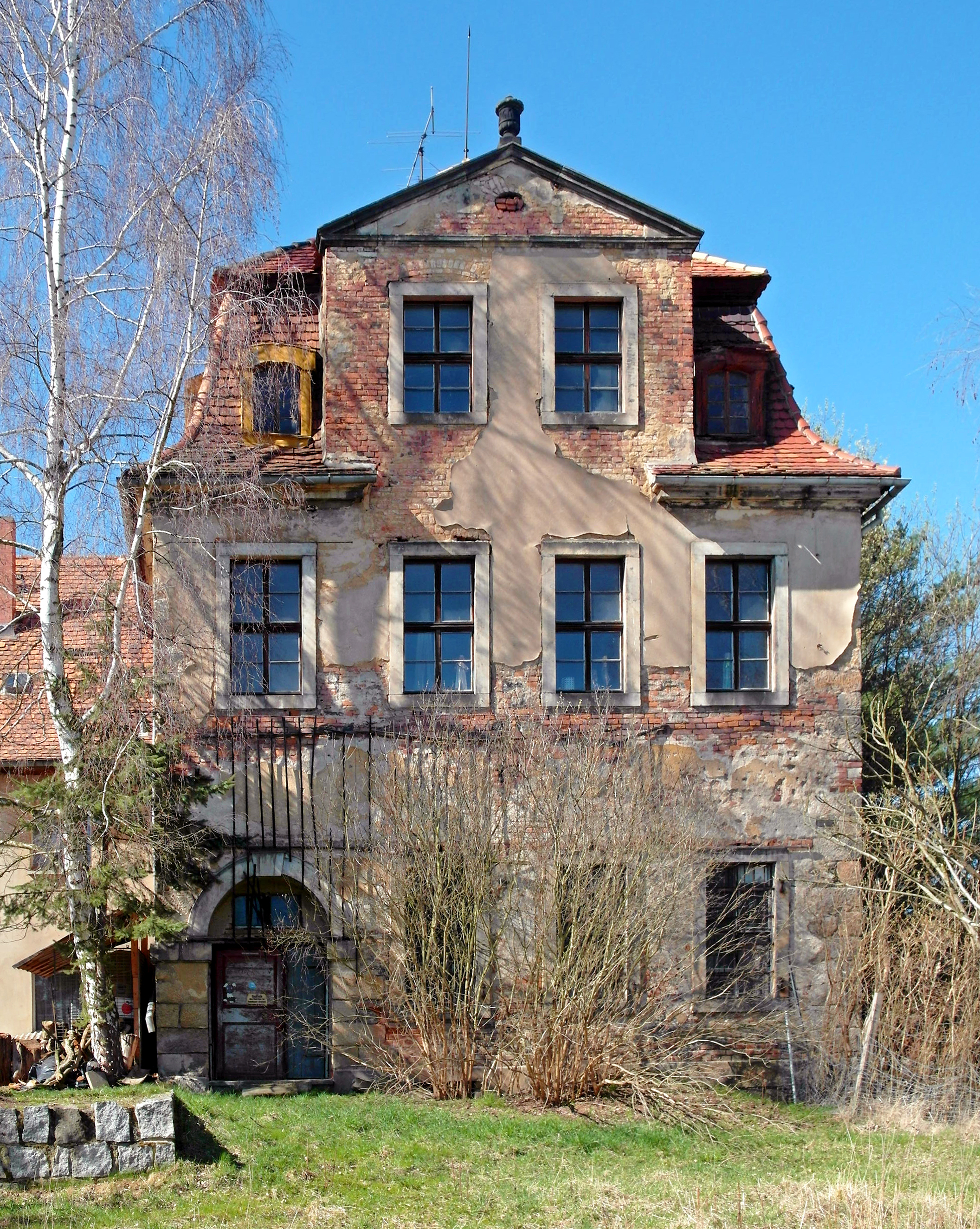 27.03.2017 02763 Hörnitz (Bertsdorf-Hörnitz) Zittauer Straße 21: Schloß Neu-Hörnitz (18. Jh.). Ab 1867 bis in die DDR-Zeit als Brauerei genutzt. Heute Privatbesitz, Leerstand. Ansicht aus dem Park von Süden. [SAM8933.JPG]20170327260DR.JPG(c)Blobelt